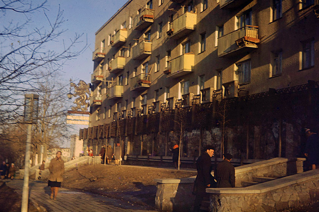 Магазин "Пазарджик", Ставрополь, ул.Ленина.(1975г.)